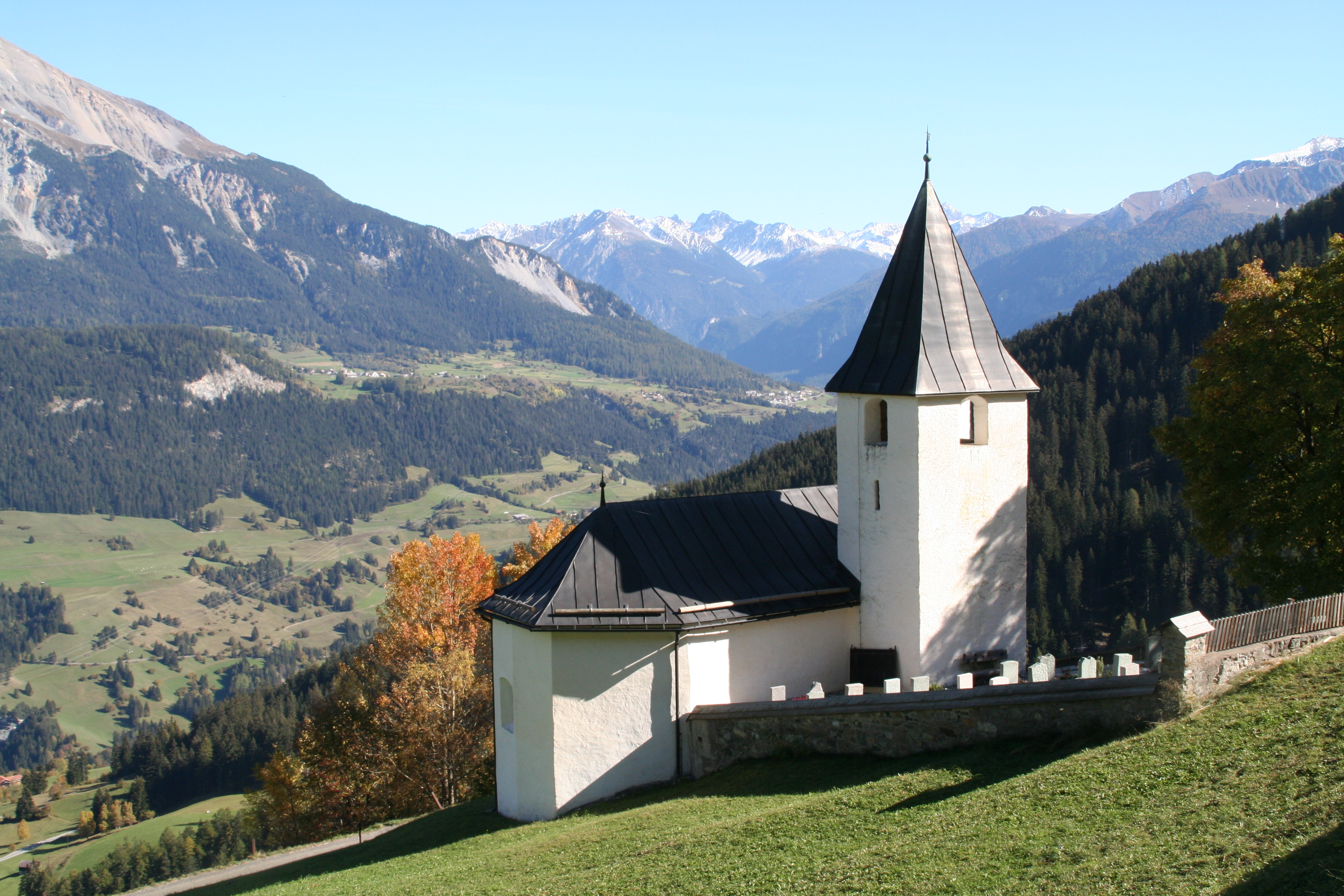 Reformierte Kirche Mutten Häuser in Obermutten